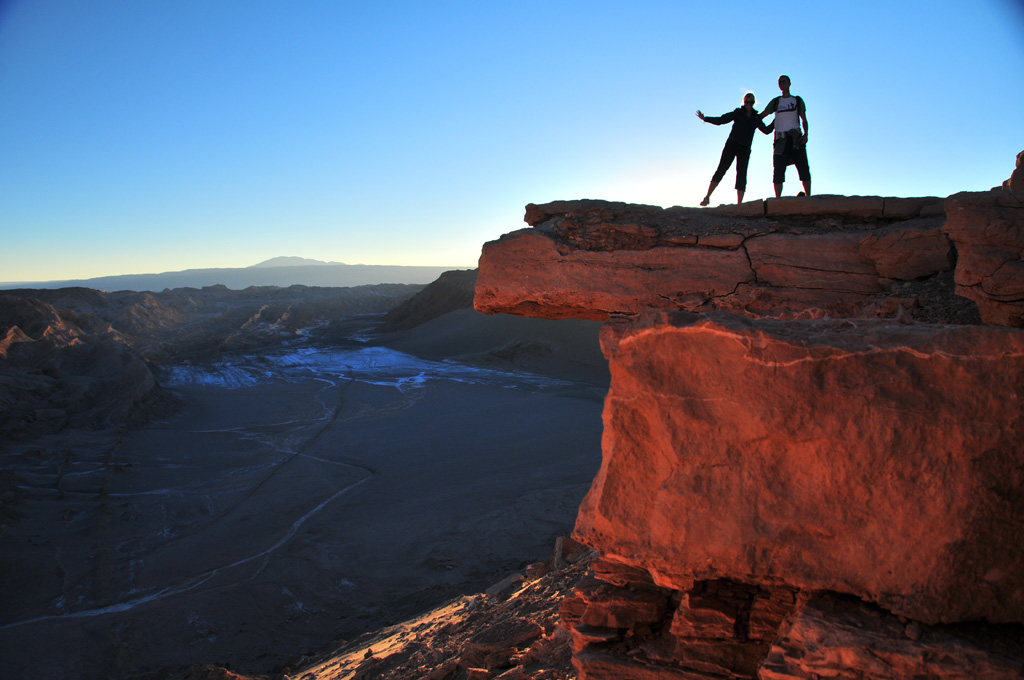 Piedra del Coyote, San Pedro de Atacama